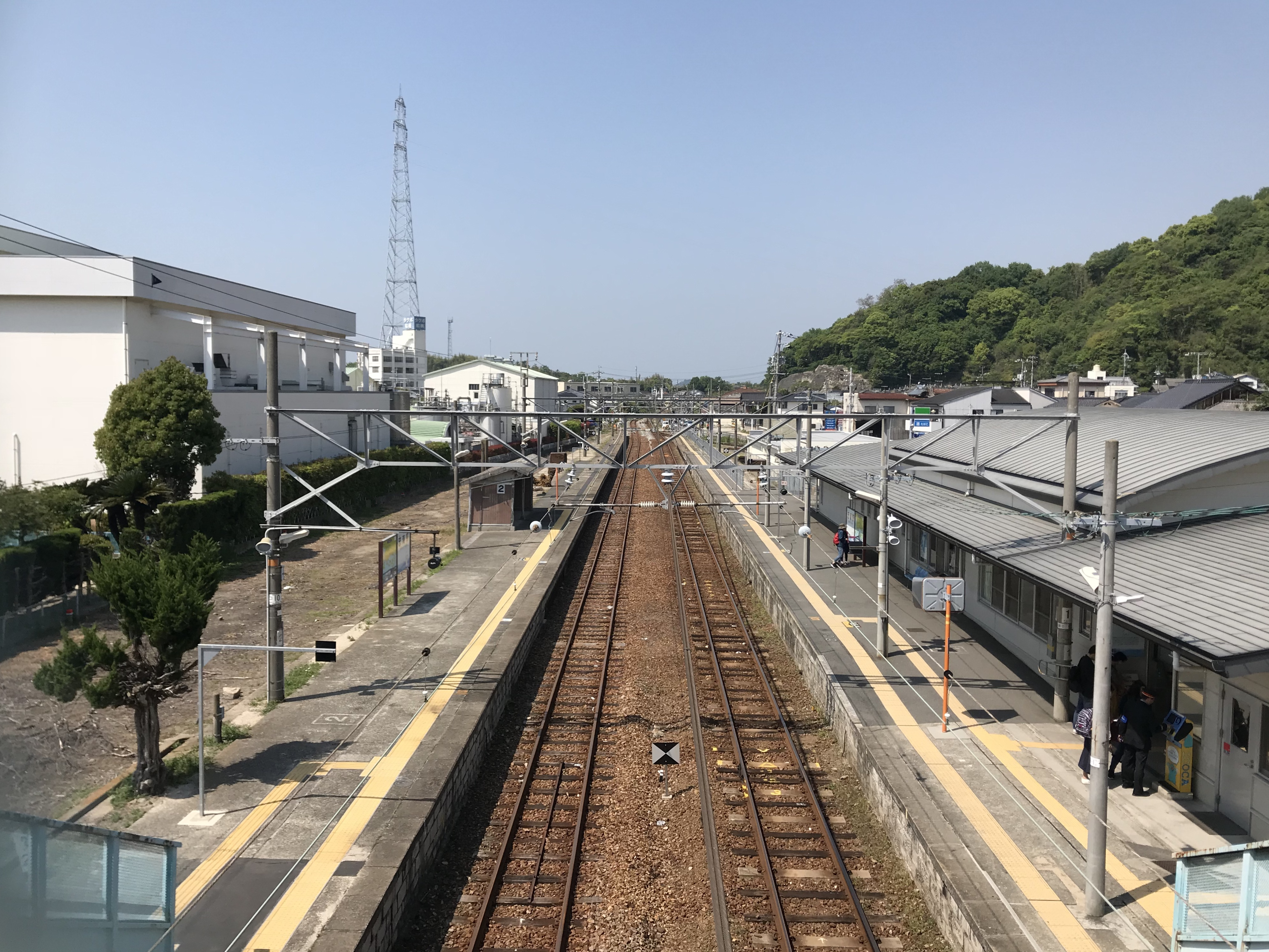 忠海駅の跨線橋より望む安芸長浜方面